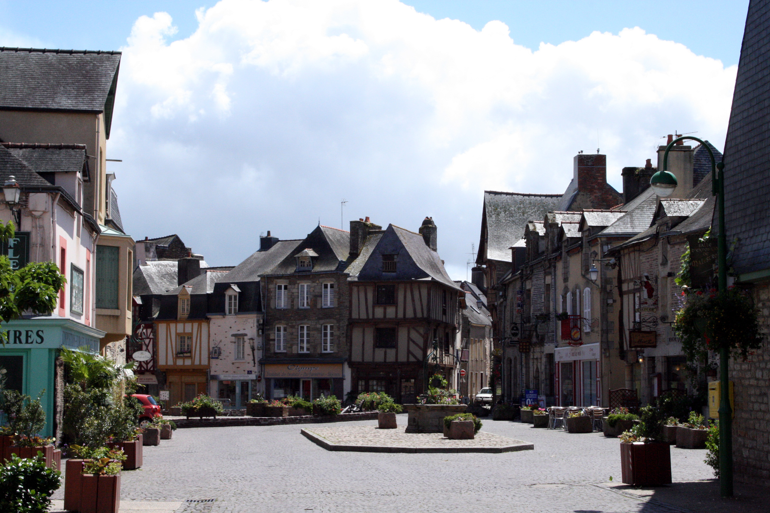 Place du Bouffay à Malestroit (Morbihan, France). .